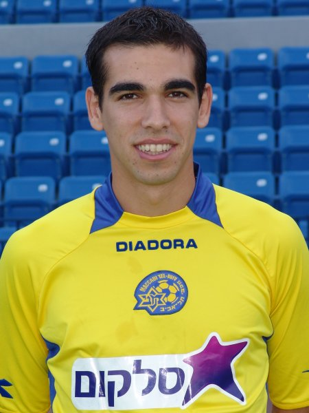 אורי שטרית, שחקן מכבי תל אביב (Uri Shitrit of Maccabi Tel Aviv)